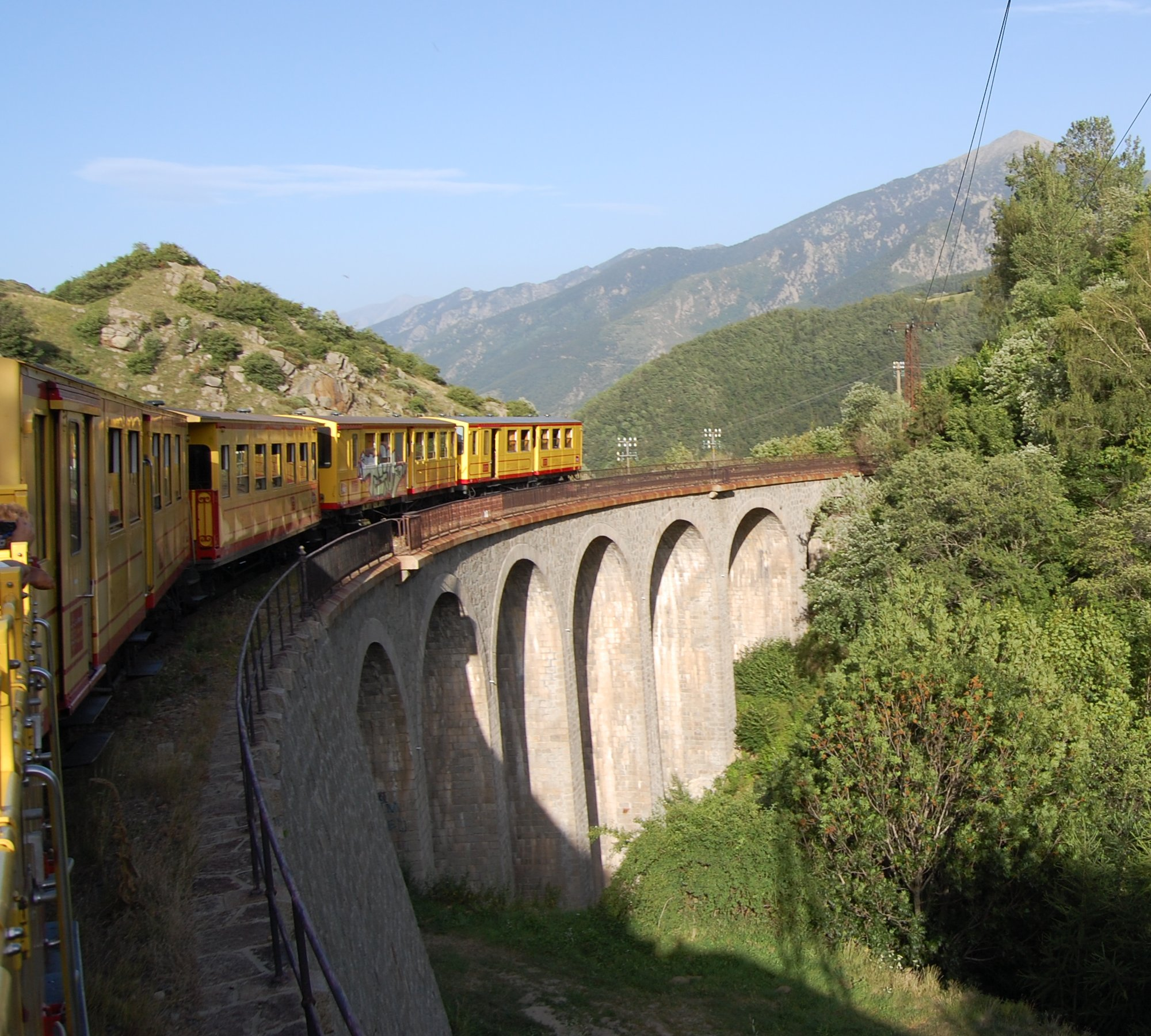 Train Jaune ; SNCF Z 100 ; été 2009